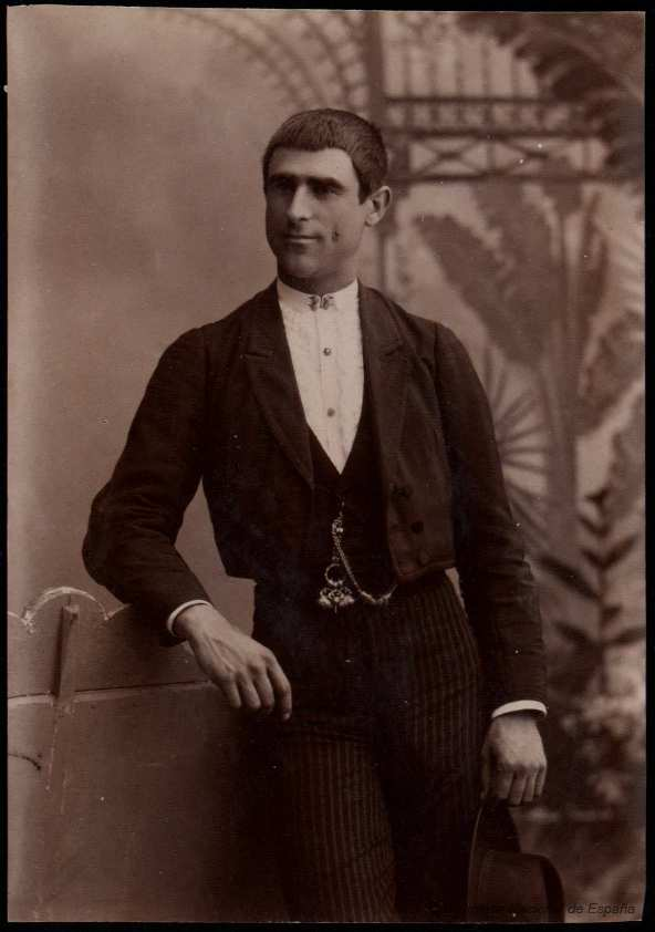 Retrato de Manene por Miquel Matorrodona, Fotografía sobre papel de albúmina. Barcelona, 1887. Biblioteca Nacional de España.